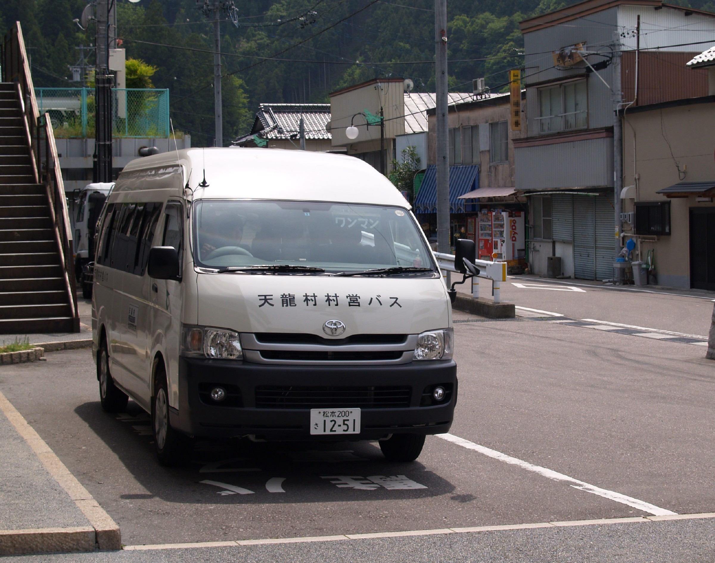 天龍村村営バス（平岡駅前にて撮影）